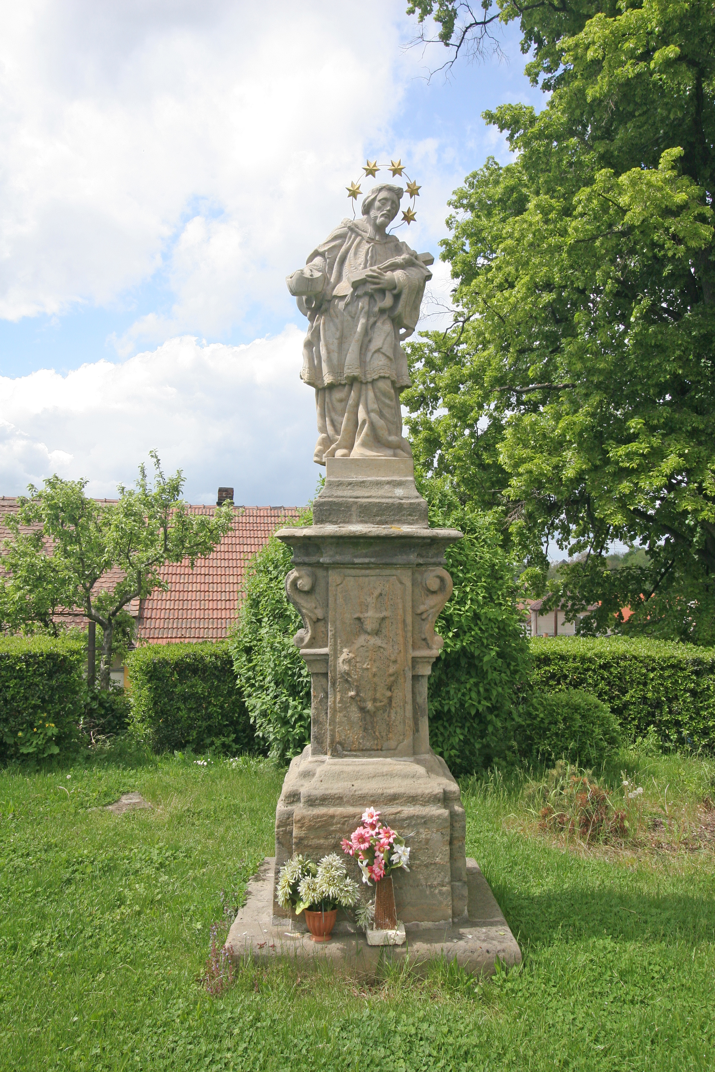 Socha sv. Jana Nepomuckého, Zájezdec